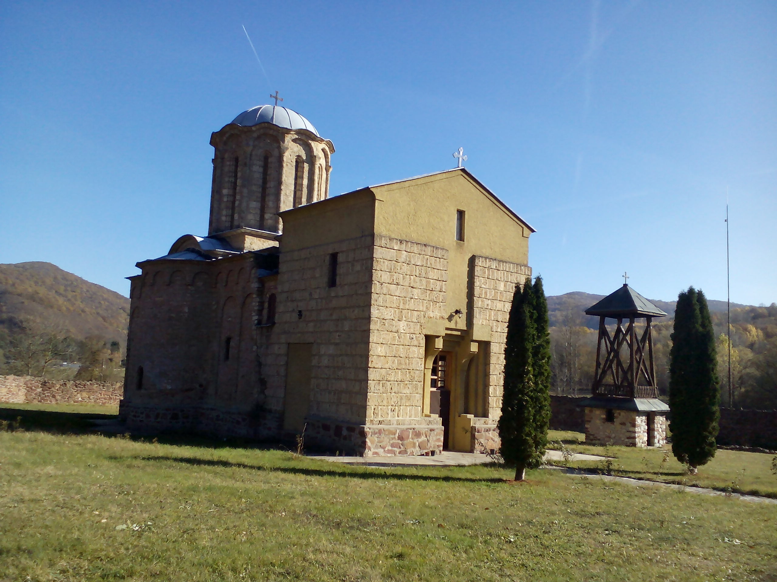 Детаљ из Сисевца